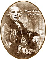 Abbildung von Hans Adam von Studnitz (1711-1788)